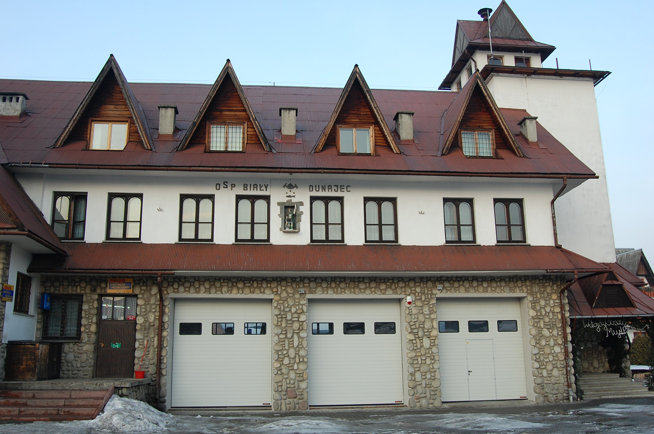 Budynek Straży pożarnej w Białym Dunajcu